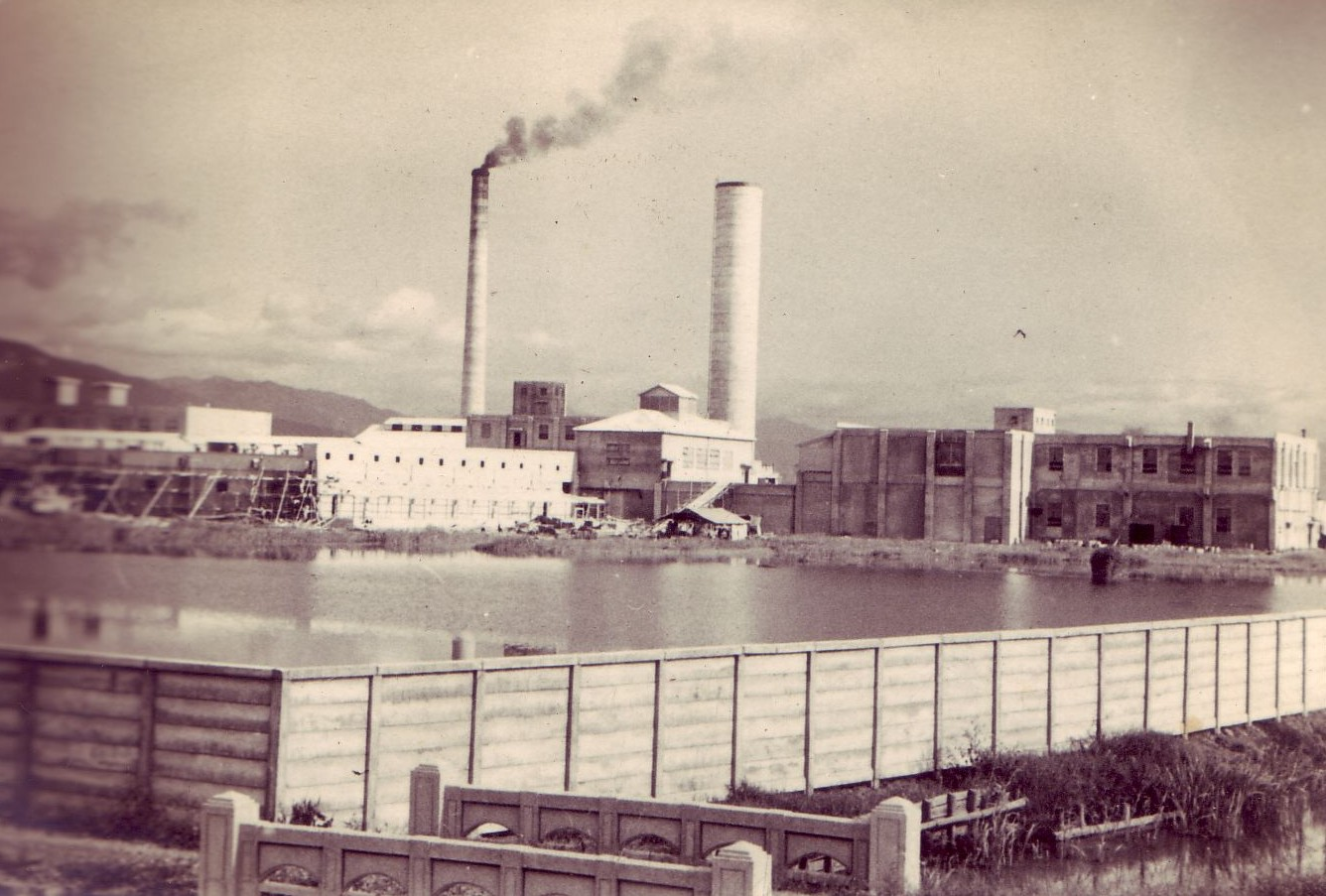 岸和田紡績大垣工場、1935年